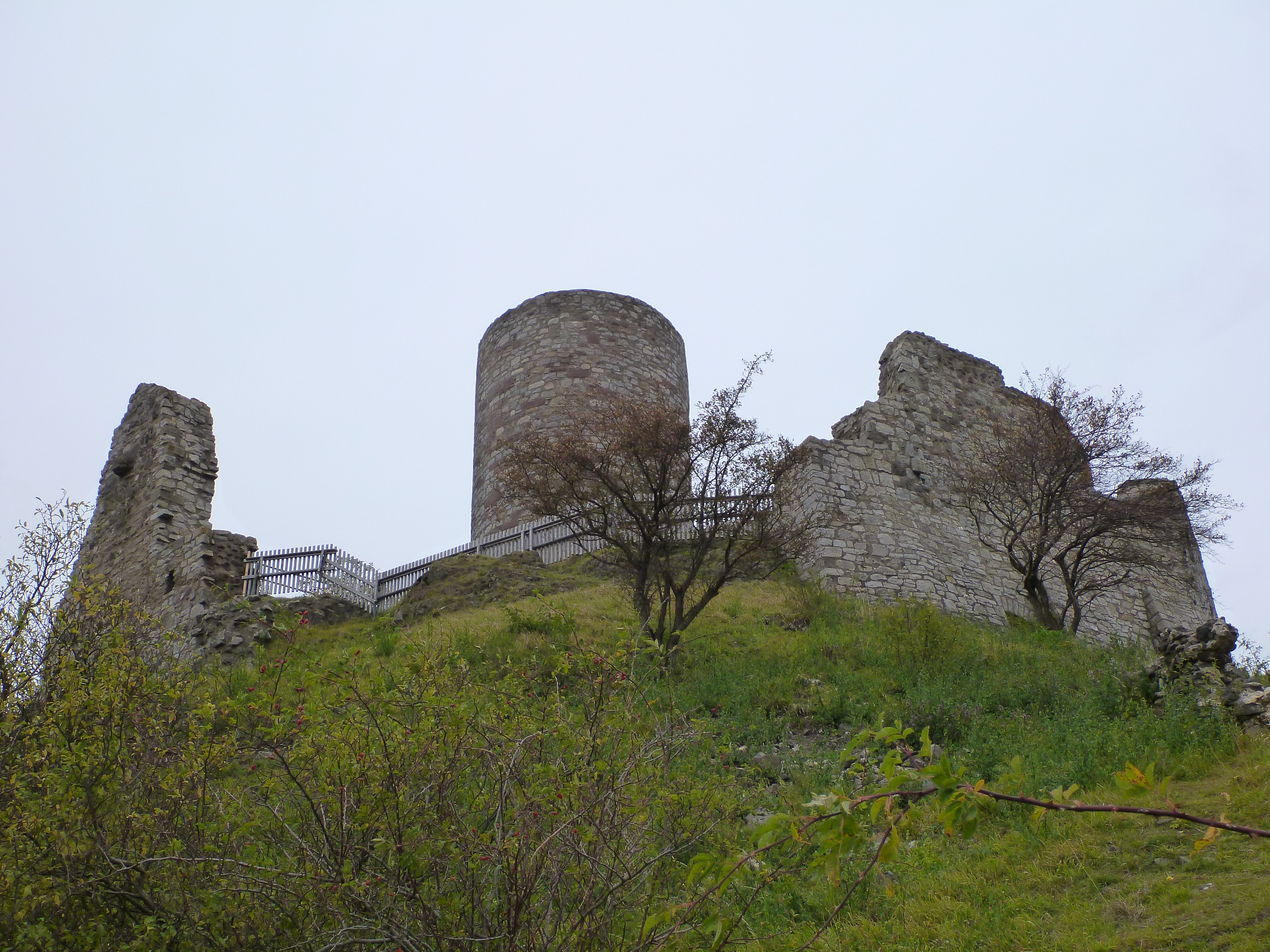 Burgruine Desenberg (Warburg, Niedersachsen)